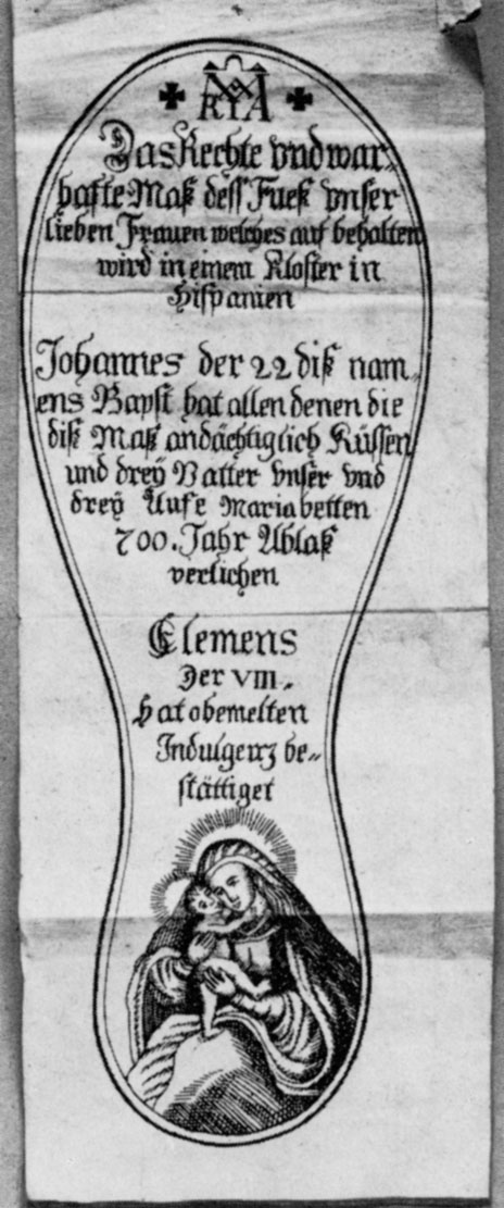 Das wahre Maß der Fußsohle Mariens. Kupferstich auf Papier, deutsch.